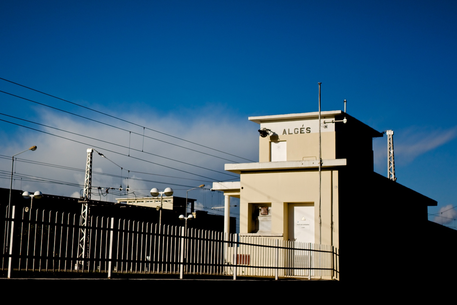 Tipo: E [Estação] Local: Algés [Linha de Cascais , PK 7] Data e hora: 2 de Dezembro de 2010 [09h15]